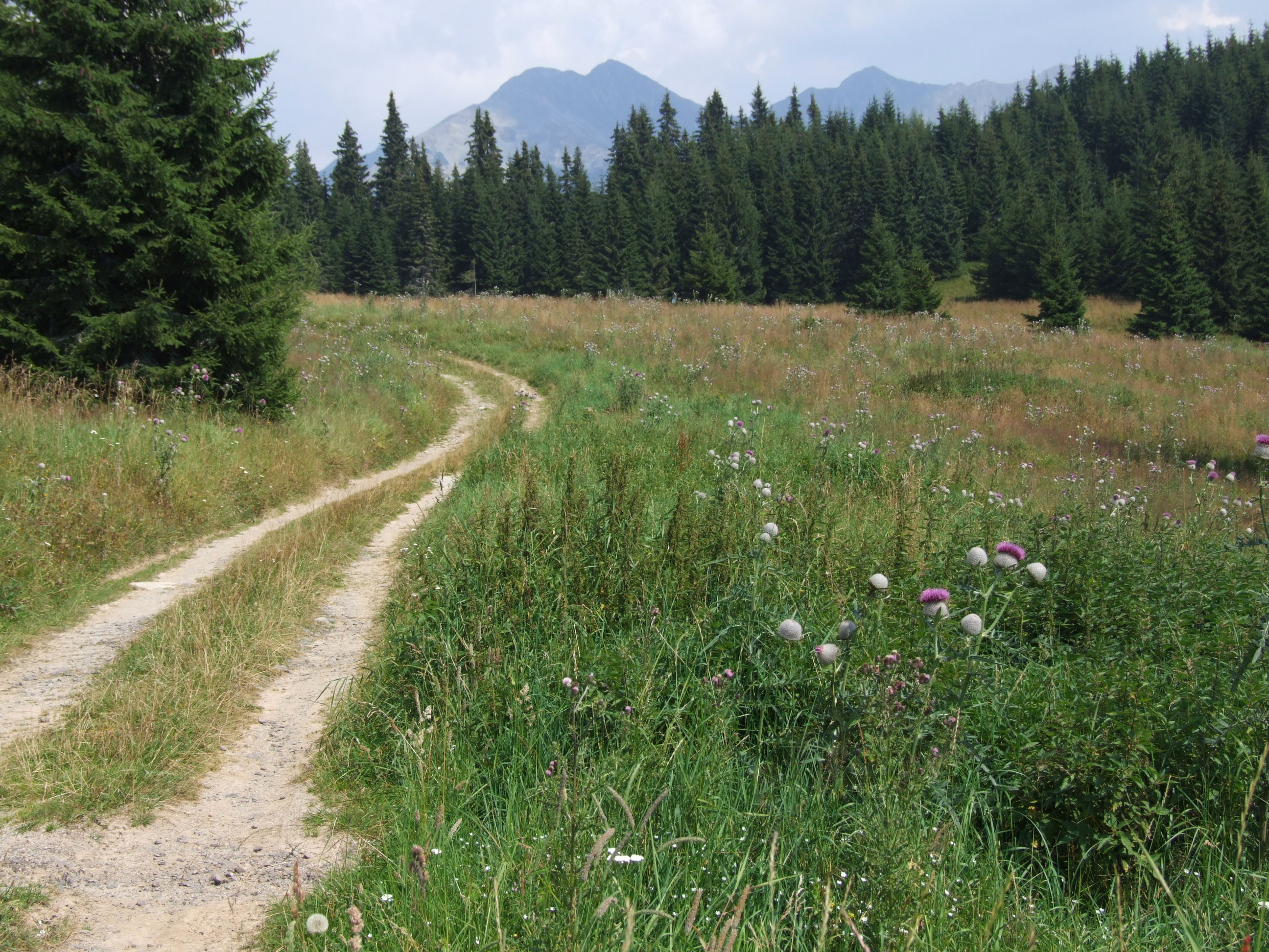 Polana Czerwieniec (Červenec) . W głębi widoczny Łysiec, Pachoł i Banówka